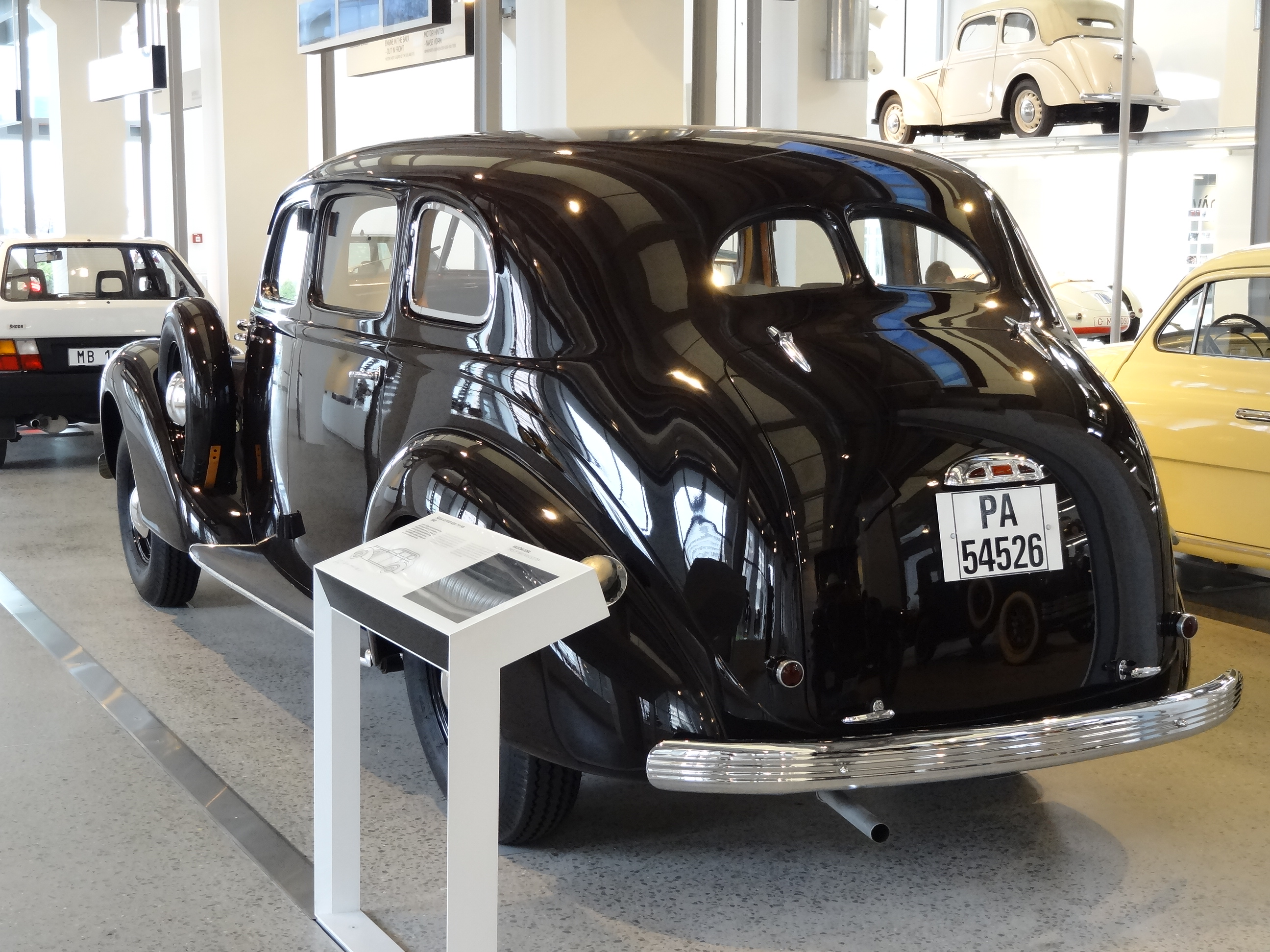 "Er wird als luxuriöses Flagschiff der Modellpalette entworfen: derSkoda Superb 4000 mit V8 Zylinder-Motor. Zehn Exemplare sind fertiggestellt, bevor der Zweite Weltkrieg ausbricht. Die 6-Zylinder-Variante Superb 3000 wird dann in hoher Stückzahl auch als Militärfahrzeug gebaut" (Hinweistafel)